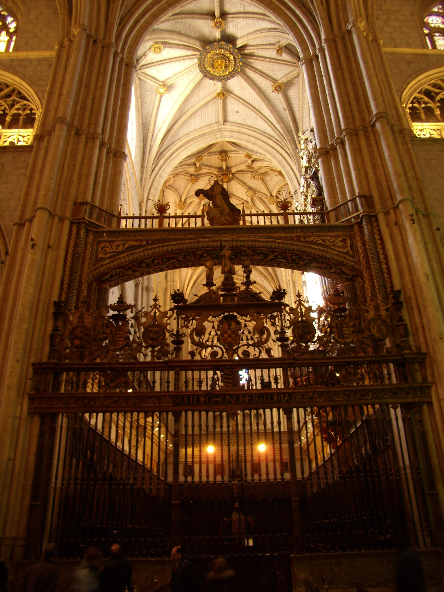 Reja del Coro de la Catedral de Palencia (España).